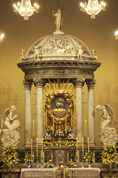 Tabernáculo. Génova, 1823. Giuseppe Gaggini. Parroquia Matriz de Nuestra Señora de la Concepción, Villa de La Orotava